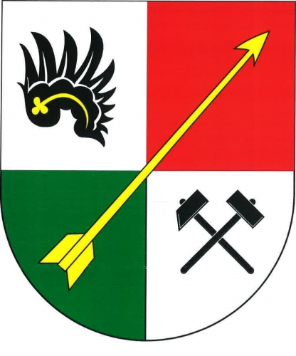 znak, Ruda, okres Žďár nad Sázavou